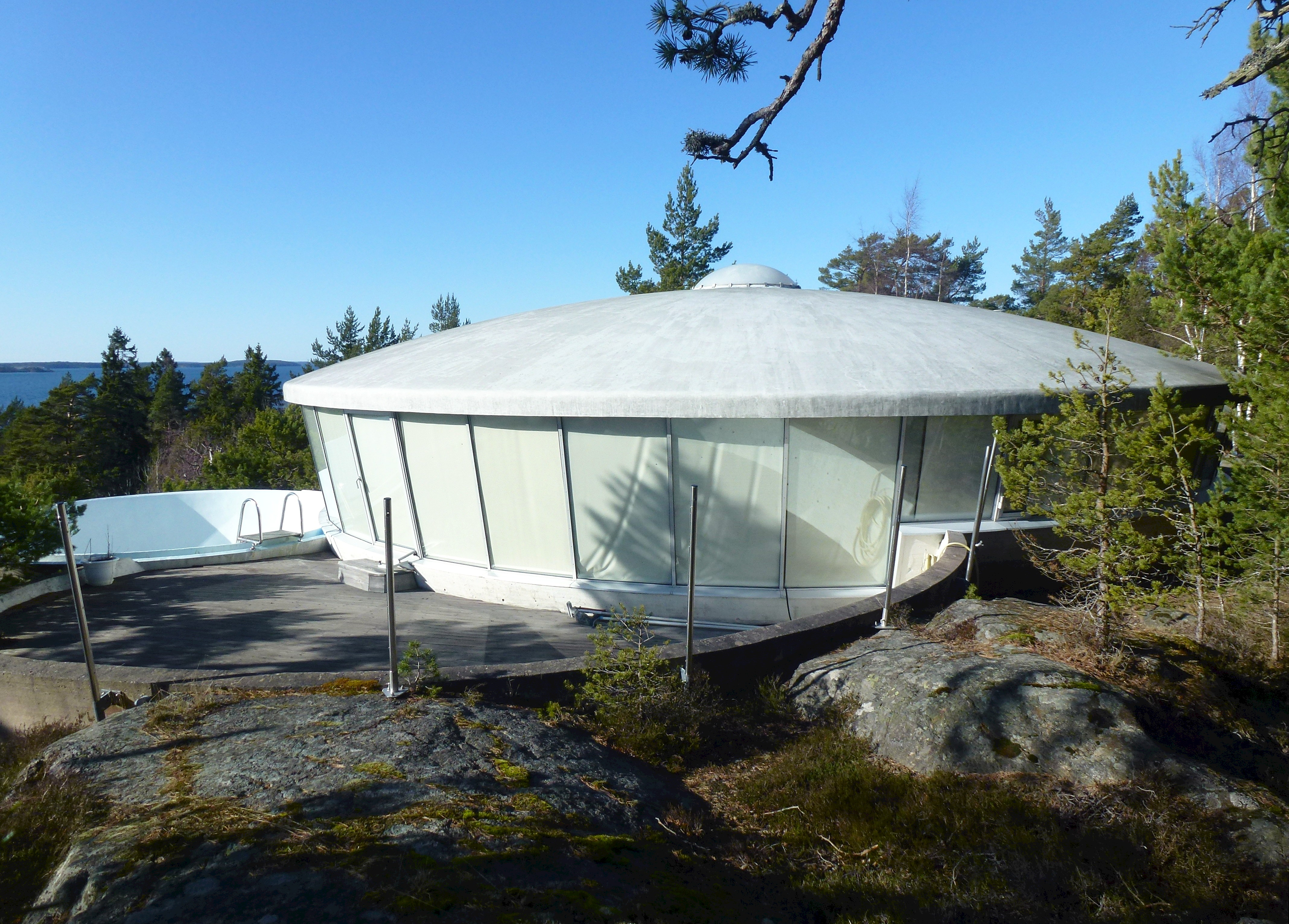 Villa Spies, Älghammar, Nynäshamns kommun